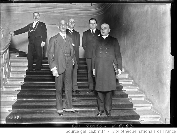 Alfred Grünberger e Ignaz Seipel en el Petit Luxembourg parisino, en 1923, para asistir a una reunión de la Sociedad de Naciones.